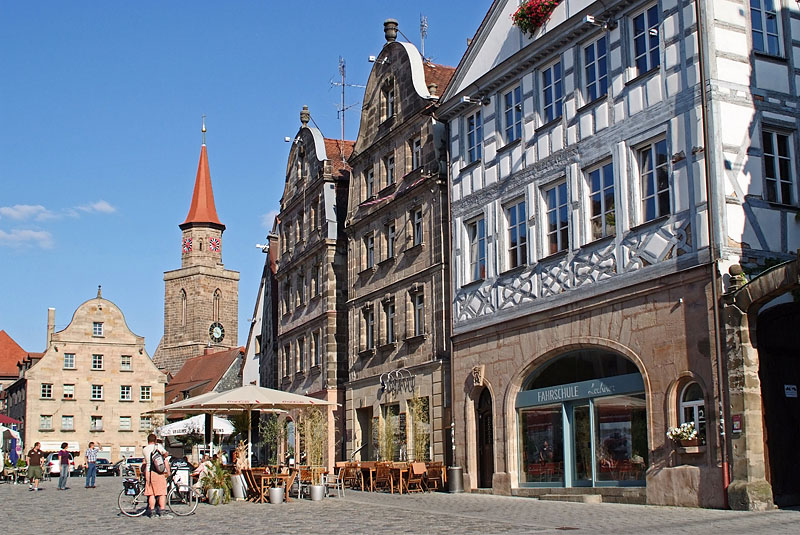 Marktplatz (Grüner Markt) Fürth